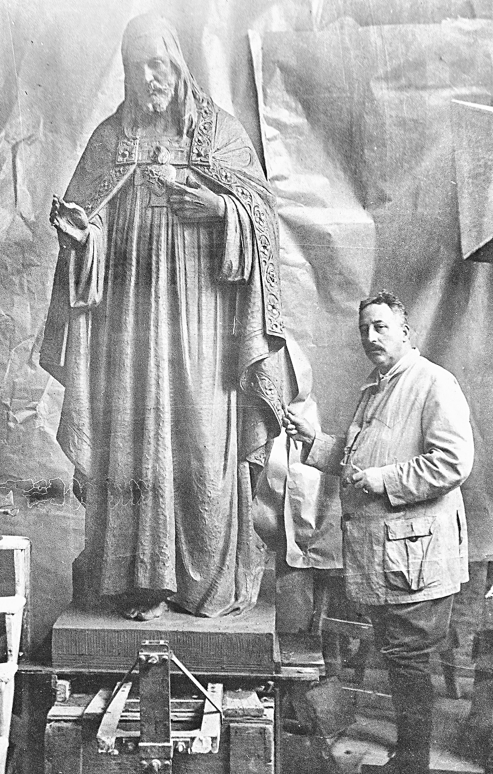 August Falise (1875-1936) bij het Heilig Hartbeeld dat hij maakte voor Sappemeer en Reuver.